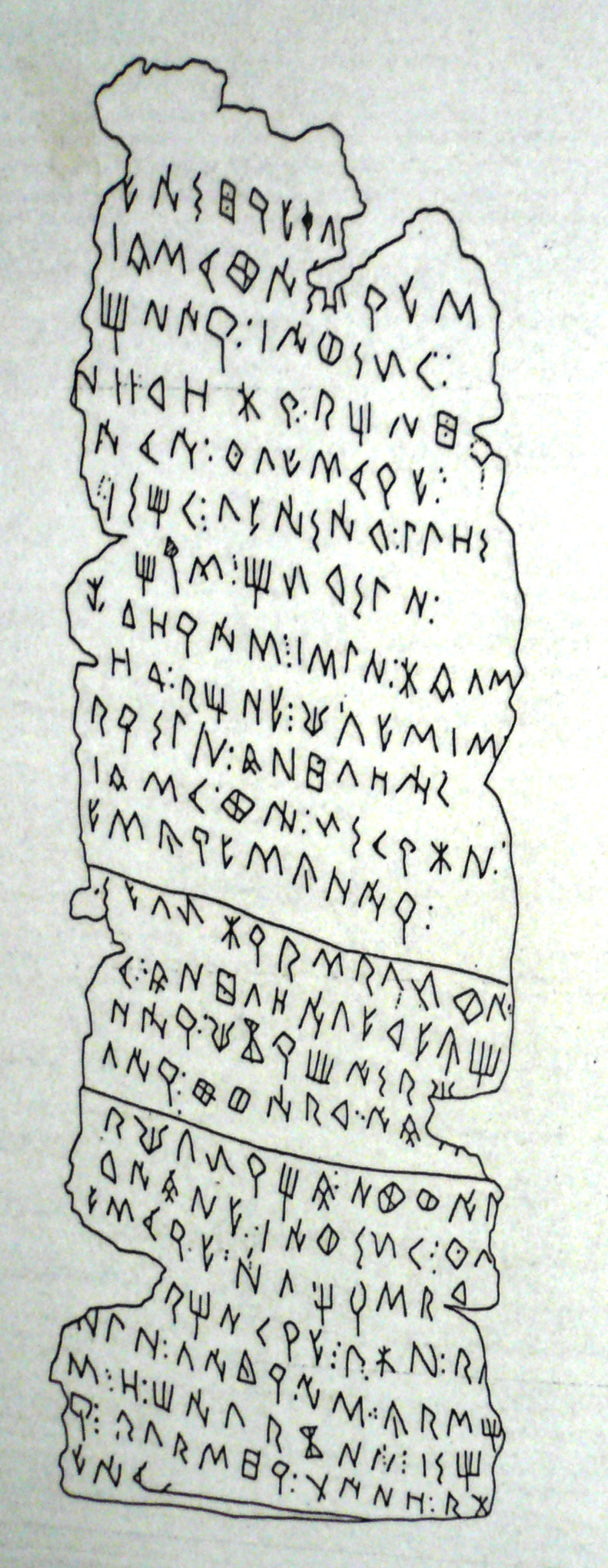 Teksto en ibera skribo kopiita de plumba ruleto trovita en Pech Maho